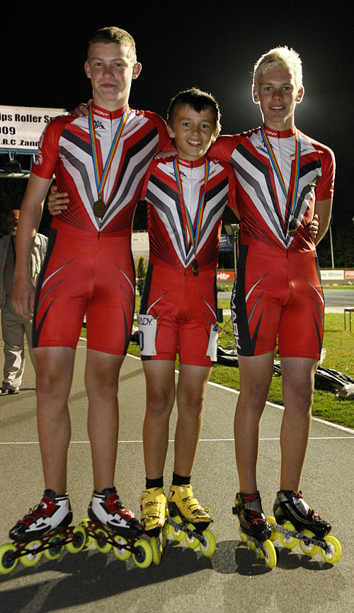 Viktor Thorup (Slagelse IK), Nikolaj Helmsøe (Vallensbæk Rulleskøjteklub) og Stefan Due Schmidt (Vallensbæk Rulleskøjteklub) vinder bronze i 3000 m stafet på bane ved EM 2009 i Zandvoorde ( European Championships Roller Speed Skating 2009) i Belgien.